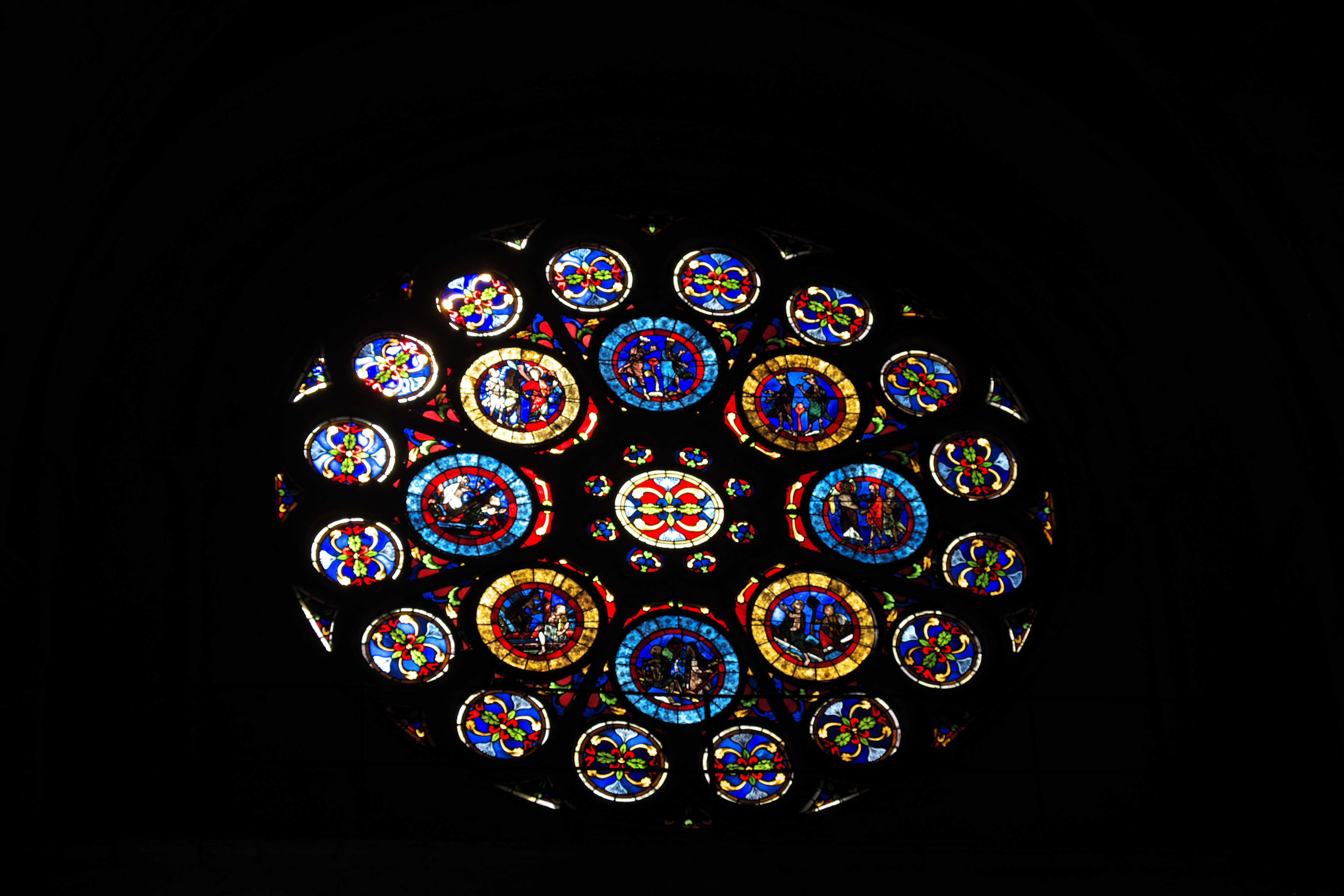 Katholische Kirche Notre-Dame-de-la-Nativité (Mariä Geburt) in Donnemarie-Dontilly im Département Seine-et-Marne (Île-de-France/Frankreich), Bleiglasfenster, Rosette aus dem 13. Jahrhundert mit Szenen des Jüngsten Gerichts